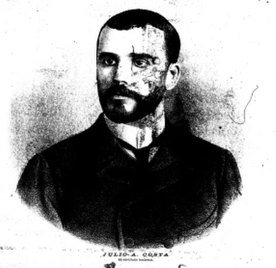 Retrato de Julio A. Costa, escritor, político y periodista argetino.